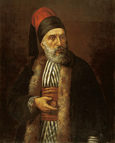 Προσωπογραφία του Ασημάκη Φωτήλα, Λάδι σε Μουσαμά, 100x79 εκ. Οικονόμου, Ιωάννης Κερτέζη Καλαβρύτων 1860 - Αθήνα 1931